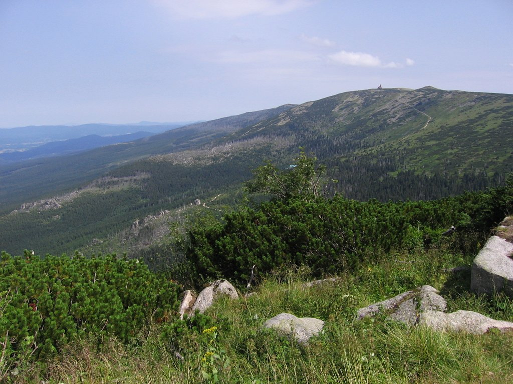 Widok ze Szrenicy na Śnieżne Kotły i Łabski Szczyt (widoczne schronisko "Pod Łabskim Szczytem" na zboczu).